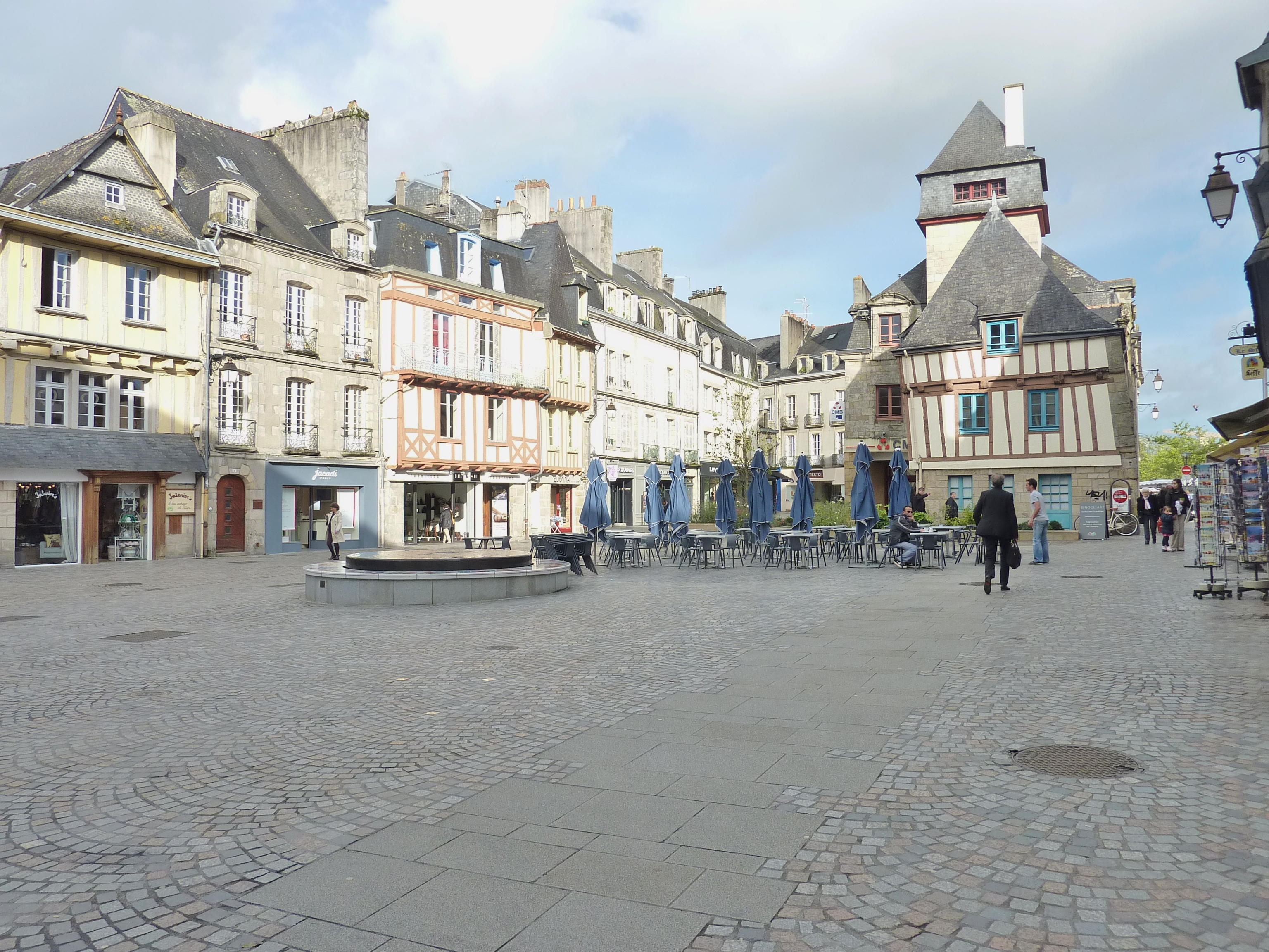 Quimper : la place Terre-au-Duc